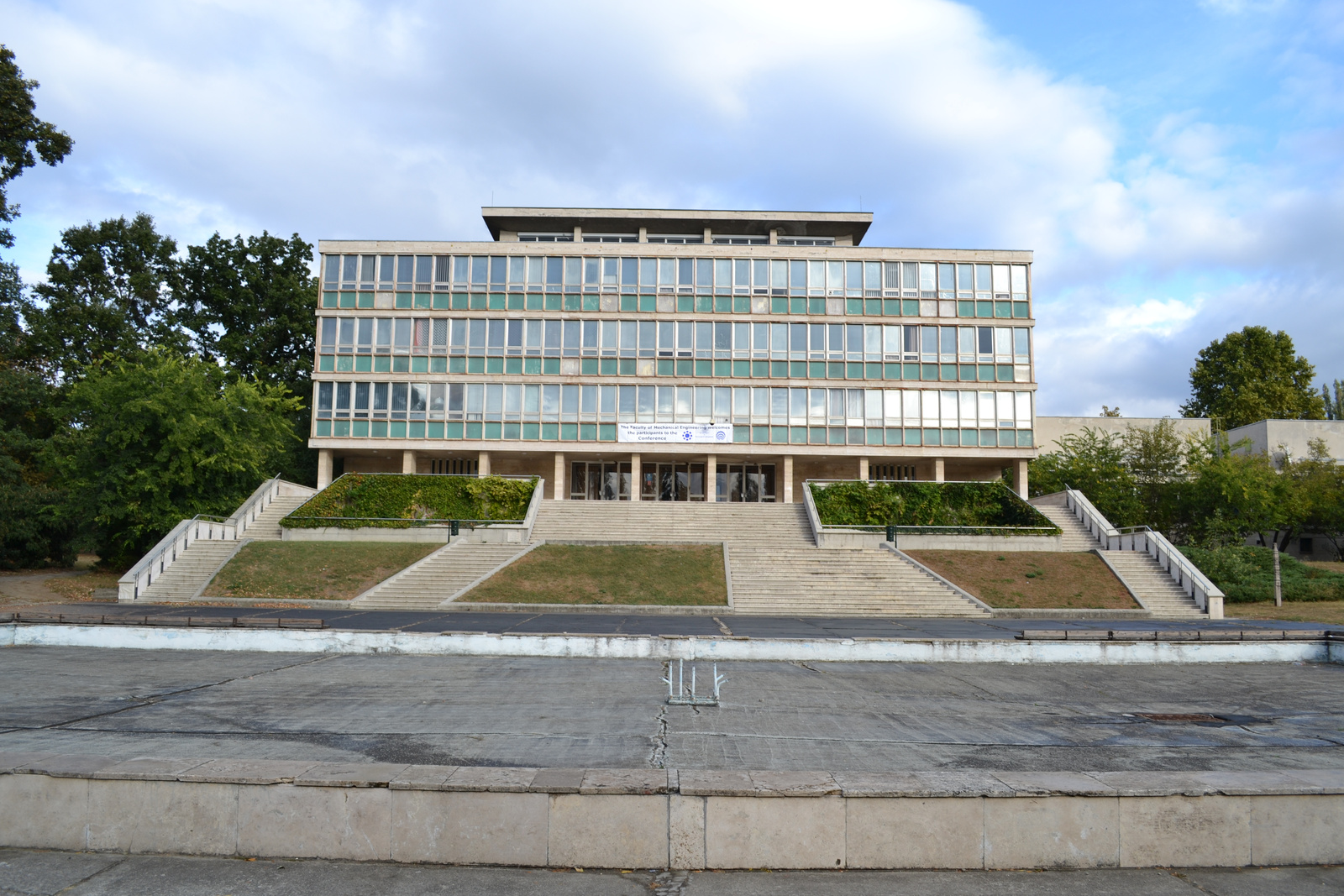 Szent István Egyetem Gépészmérnöki Karának épülete (Gödöllő, Páter Károly u. 1. (campus)) This is a photo of a monument in Hungary, Identifier: 15416